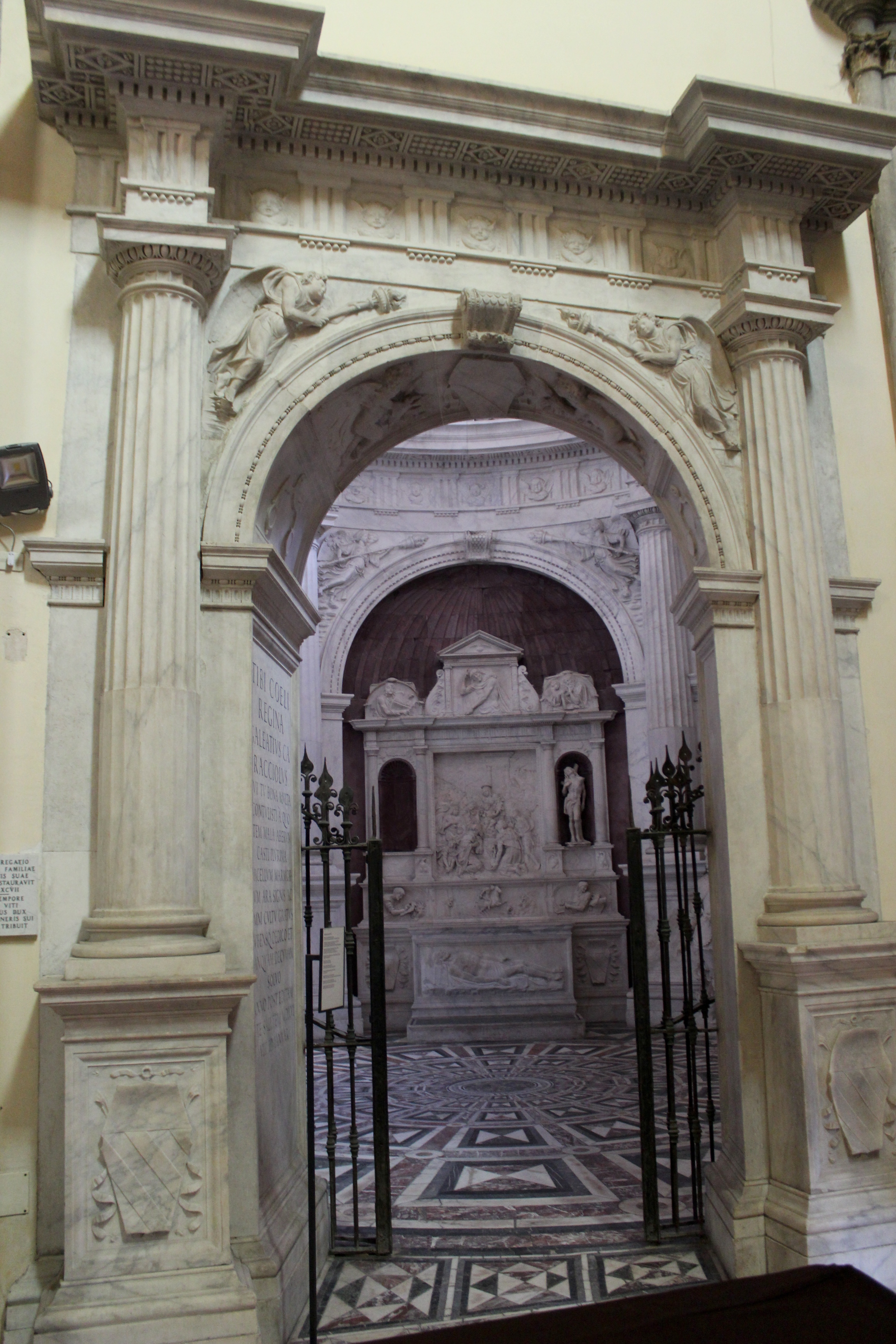 Nápoles. San Giovanni a Carbonara. Capilla Caracciolo di Vico. Portada.